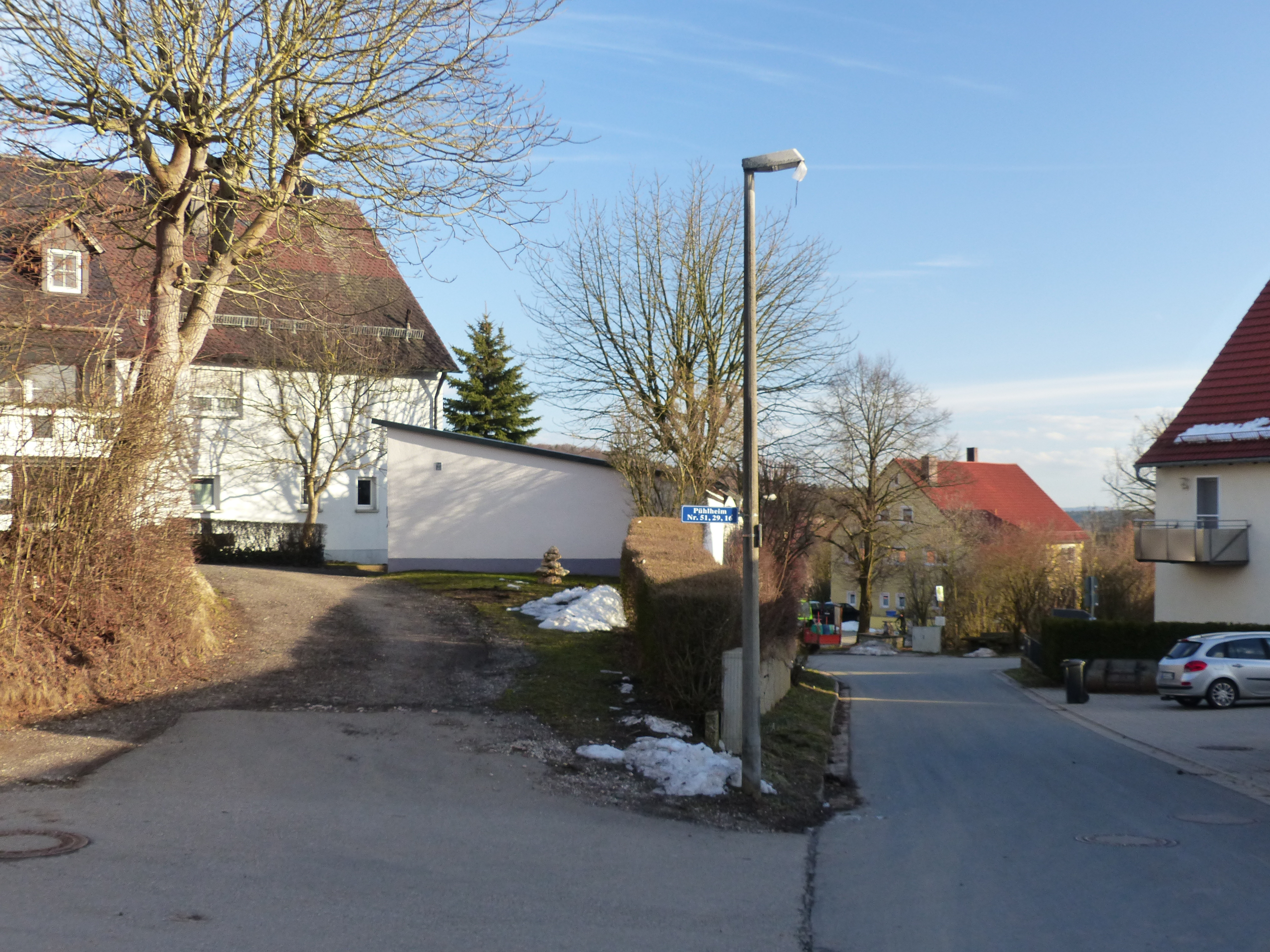 Hausnummernschild in Pühlheim, einem Ortsteil der Stadt Altdorf bei Nürnberg